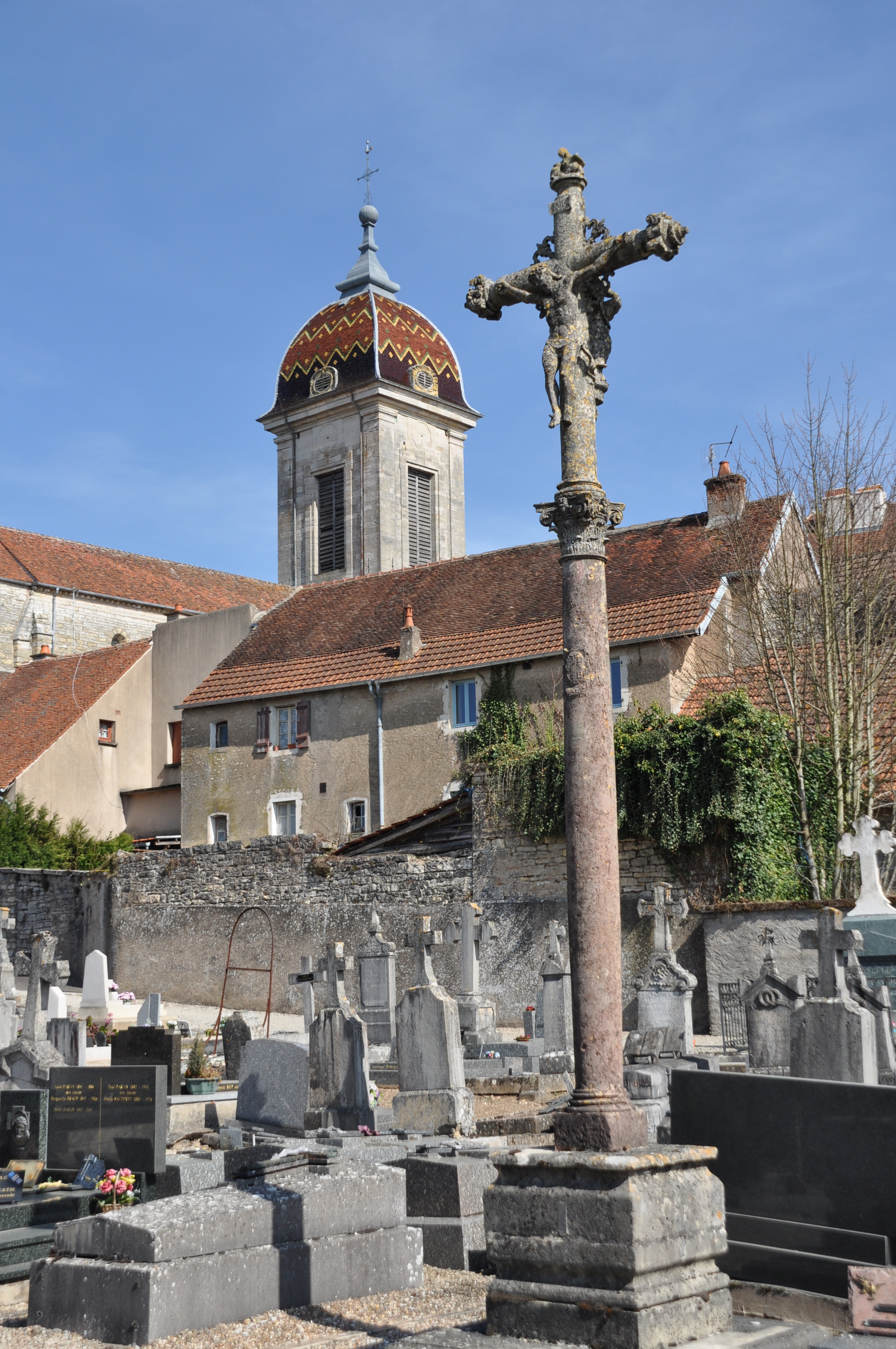 Croix du cimetière de Pesmes, (Classé, 1903) (Haute-Saône) .